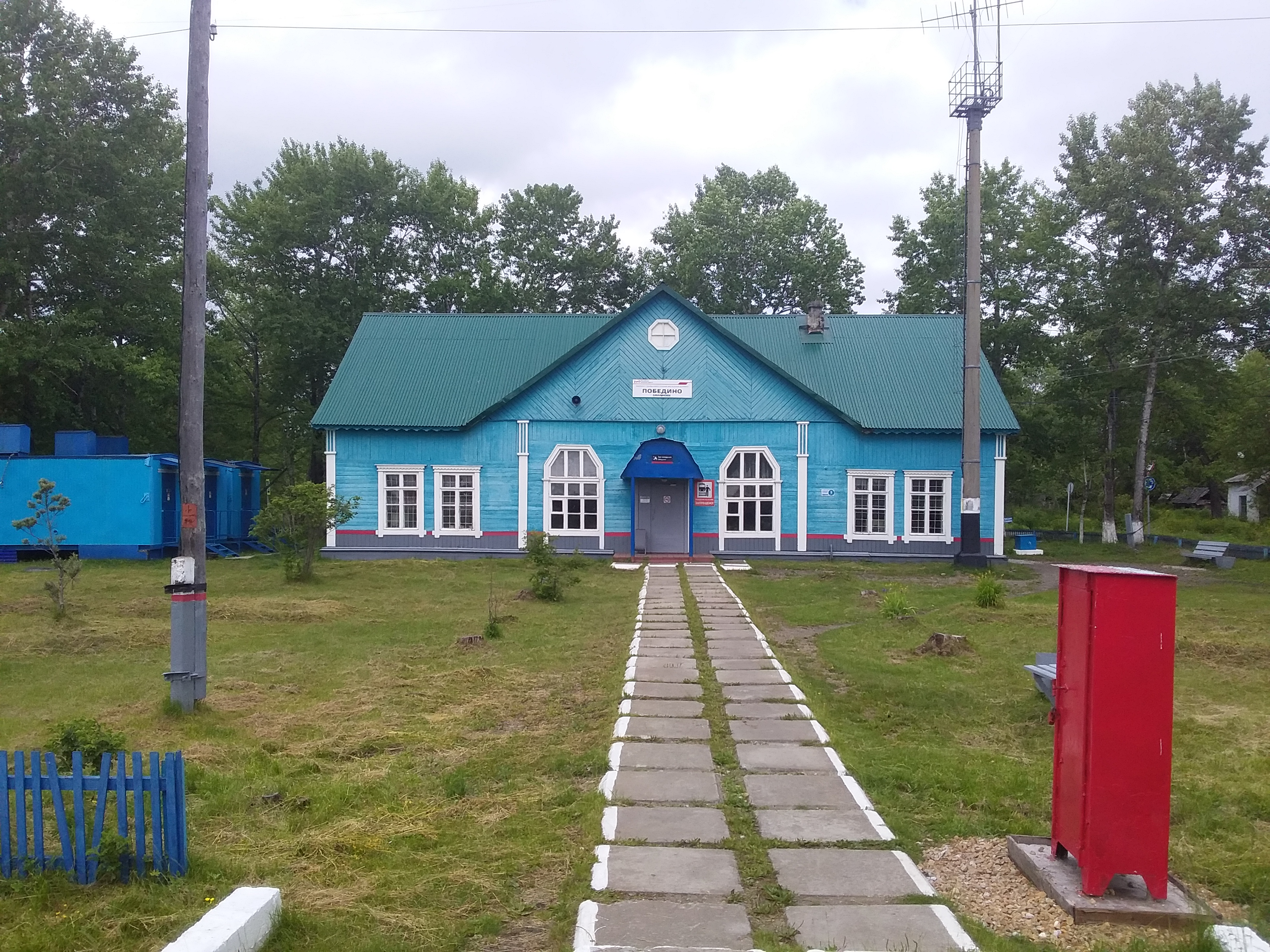 Сахалинский регион ДВЖД, станция Победено, со стороны платформы